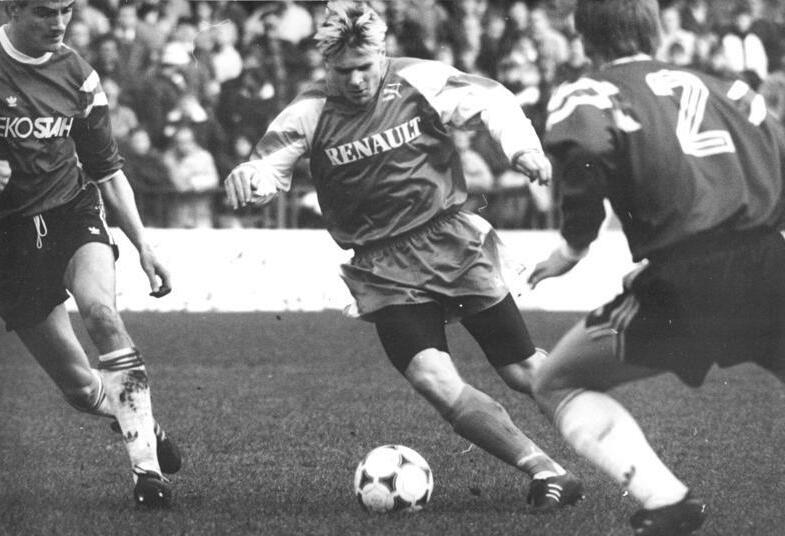 ADN-Rainer Weisflog-24.11.90 Cottbus: Fußball-Oberliga FC Energie Cottbus - Eisenhüttenstädter FC Stahl 0:0 Ein am Ende leistungsgerechtes Unentschieden, nach klaren Vorteilen für Cottbus in der ersten halben Stunde und dann mehr verteiltem Geschehen mit zunehmend gefährlicheren Eisenhüttenstädtern Kontern bestimmte das Spiel. Szene zwischen Ingo Schneider (M.-Cottbus) und Olaf Sakasch (r.-Eisenhüttenstadt).